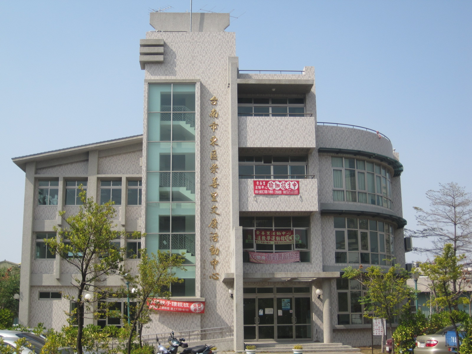 臺南市東區崇善里活動中心